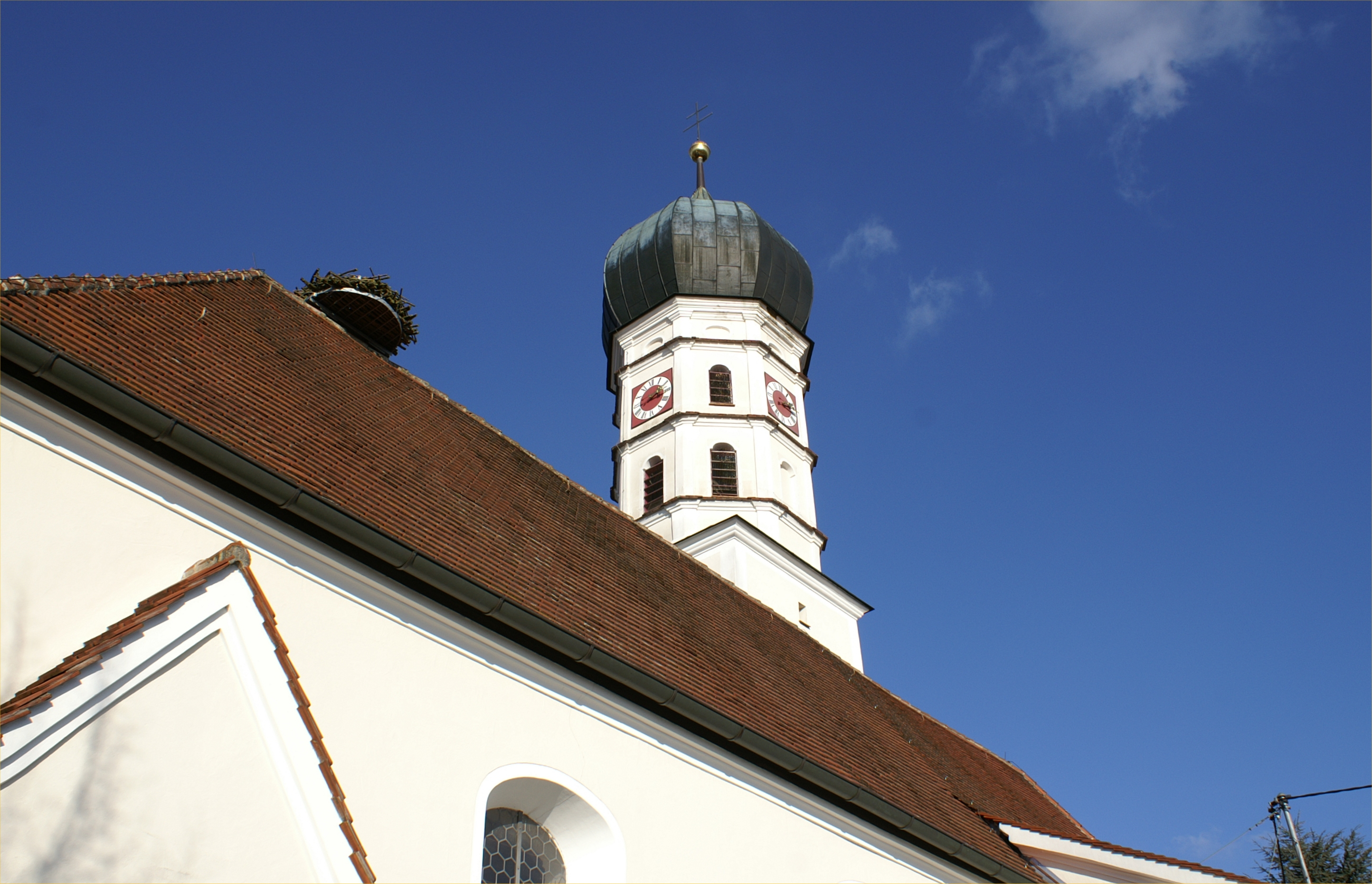 Sankt Mammas-Kirche im Neu-Ulmer Stadtteil Finningen. Sankt Mammas ist der Schutzpatron des Viehs, der Herden, Höfe und der Steuerzahler